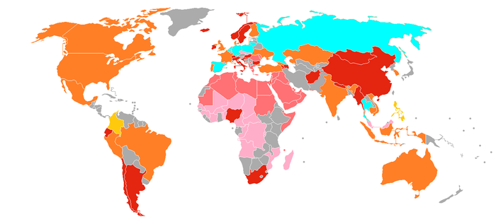 mapa przedstawia aktualne wersje programu w poszczególnych krajach.